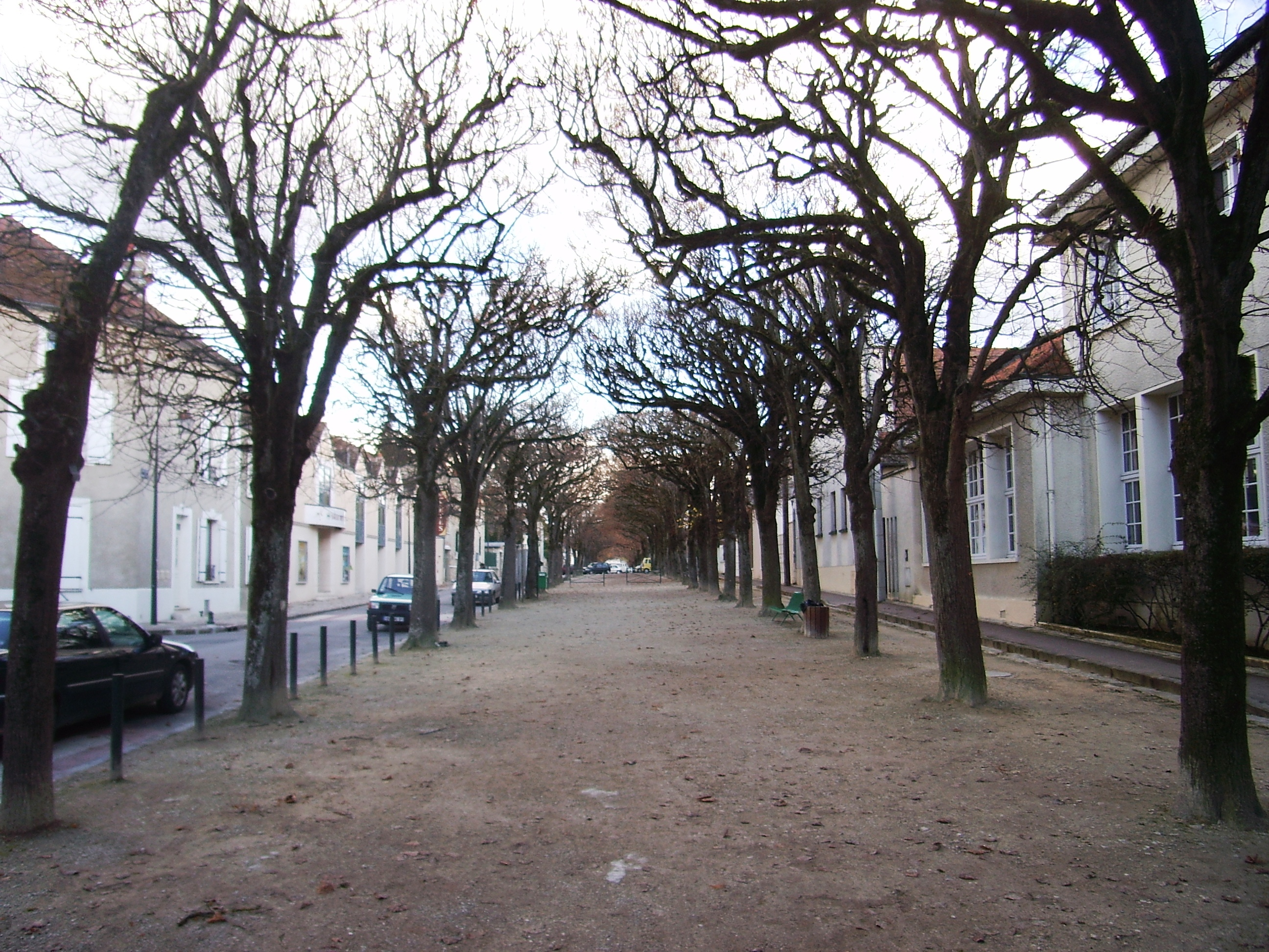 Alignement du boulevard du Maréchal Lyautey à Milly-la-Forêt (91)